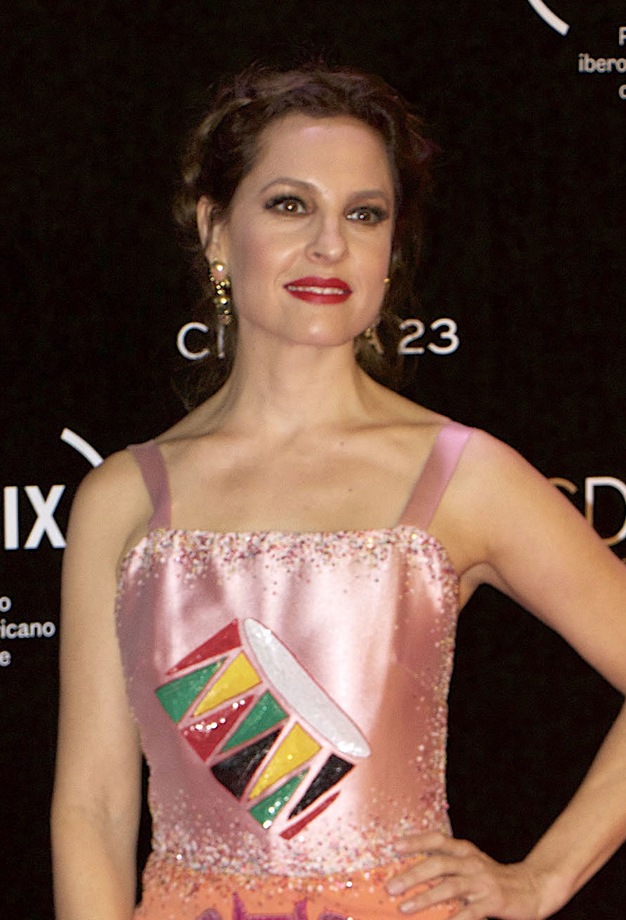 Miércoles 7 de noviembre de 2018. Previo a la entrega de los Premios Fénix 2018, actores, actrices, elencos de las películas y series nominadas, pasaron por la alfombra roja, en la parte exterior del Teatro de la Ciudad Esperanza Iris. Fotografía: Milton Martínez / Secretaría de Cultura CDMX.